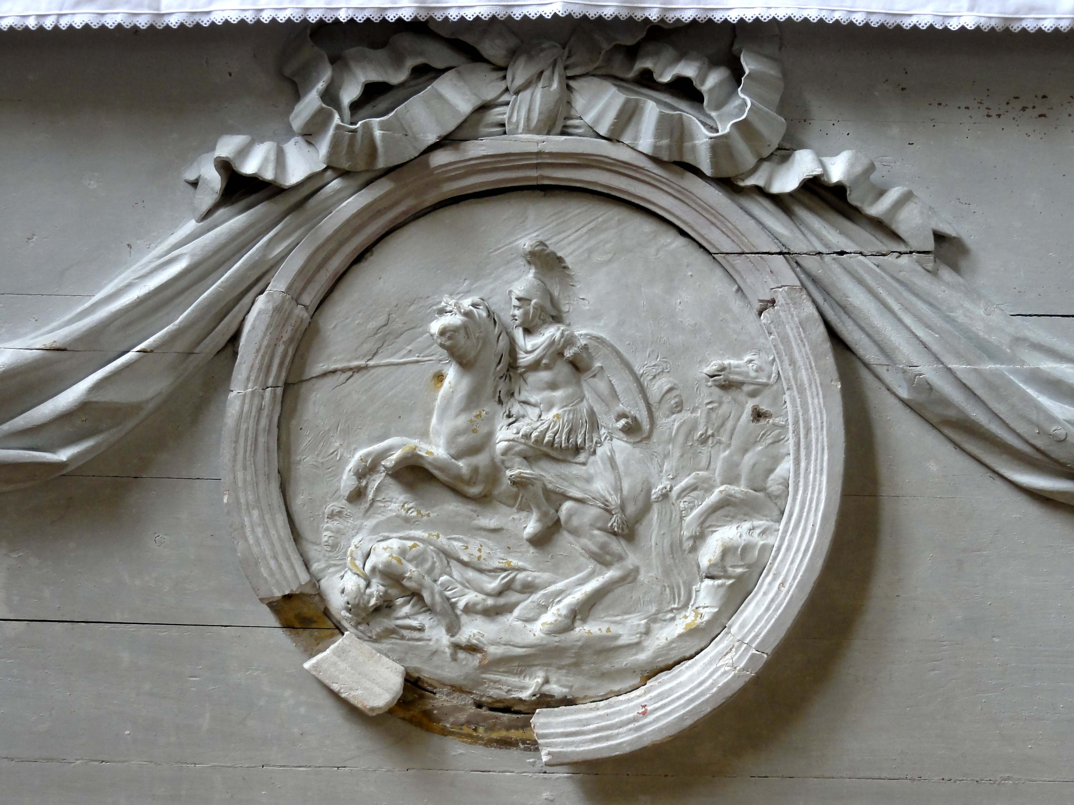 Bas-relief - la conversion de St Paul sur le chemin de Damas, terre cuite, XVIIIe siècle.